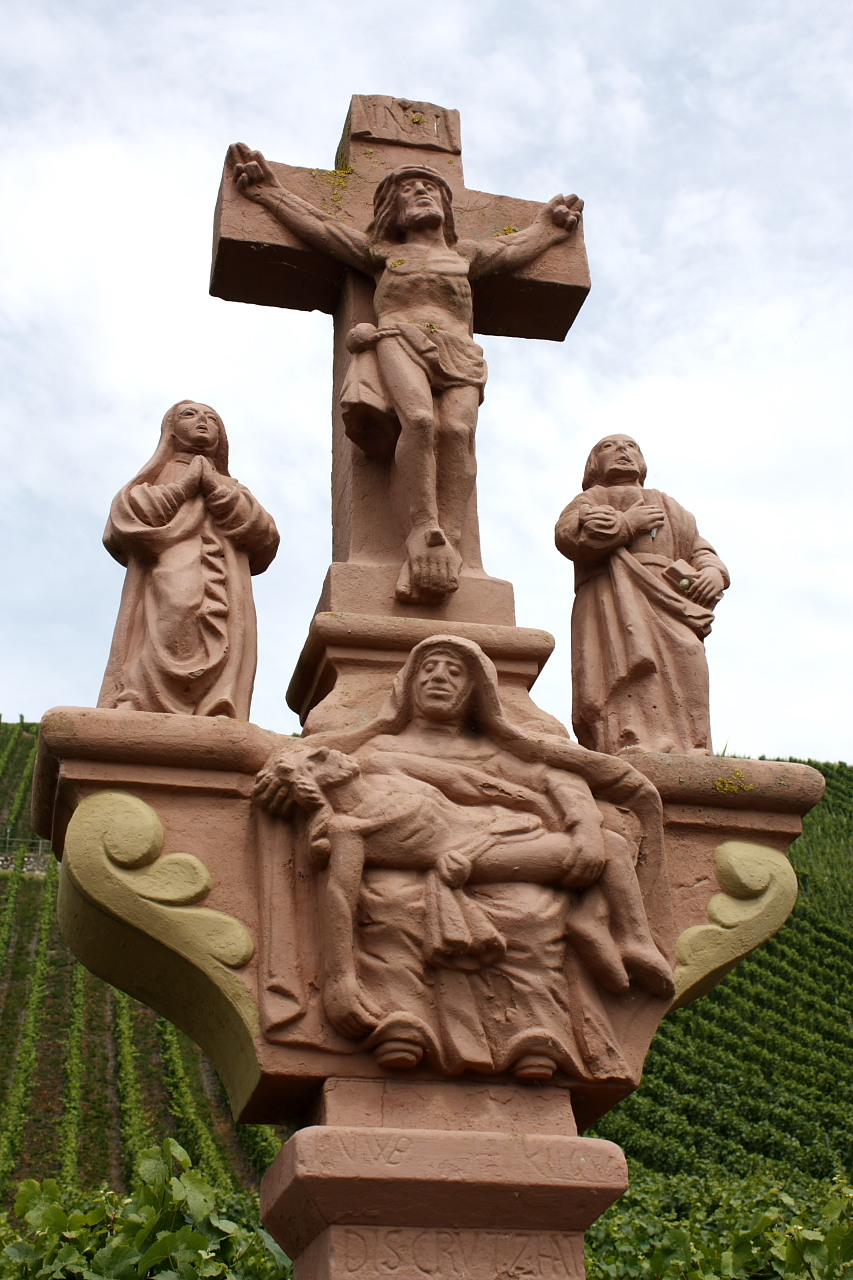 Wegekreuz von 1701 in Lösnich auf der anderen Moselseite II